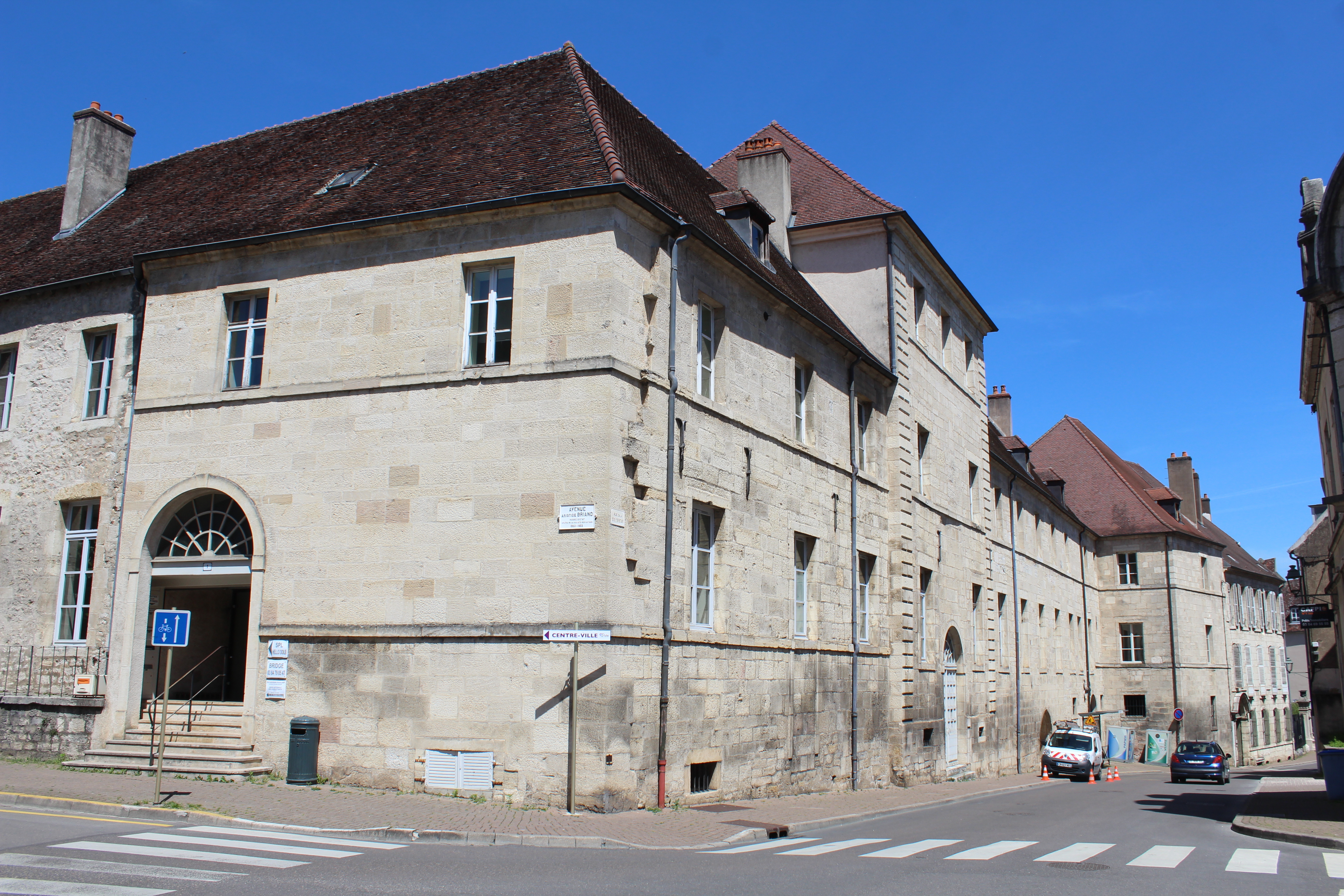 Collège Saint-Jérôme, Dole